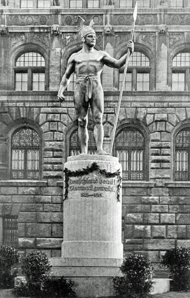 Modell für ein Bismarck- (Germanen-) Denkmal 1915 in Leipzig